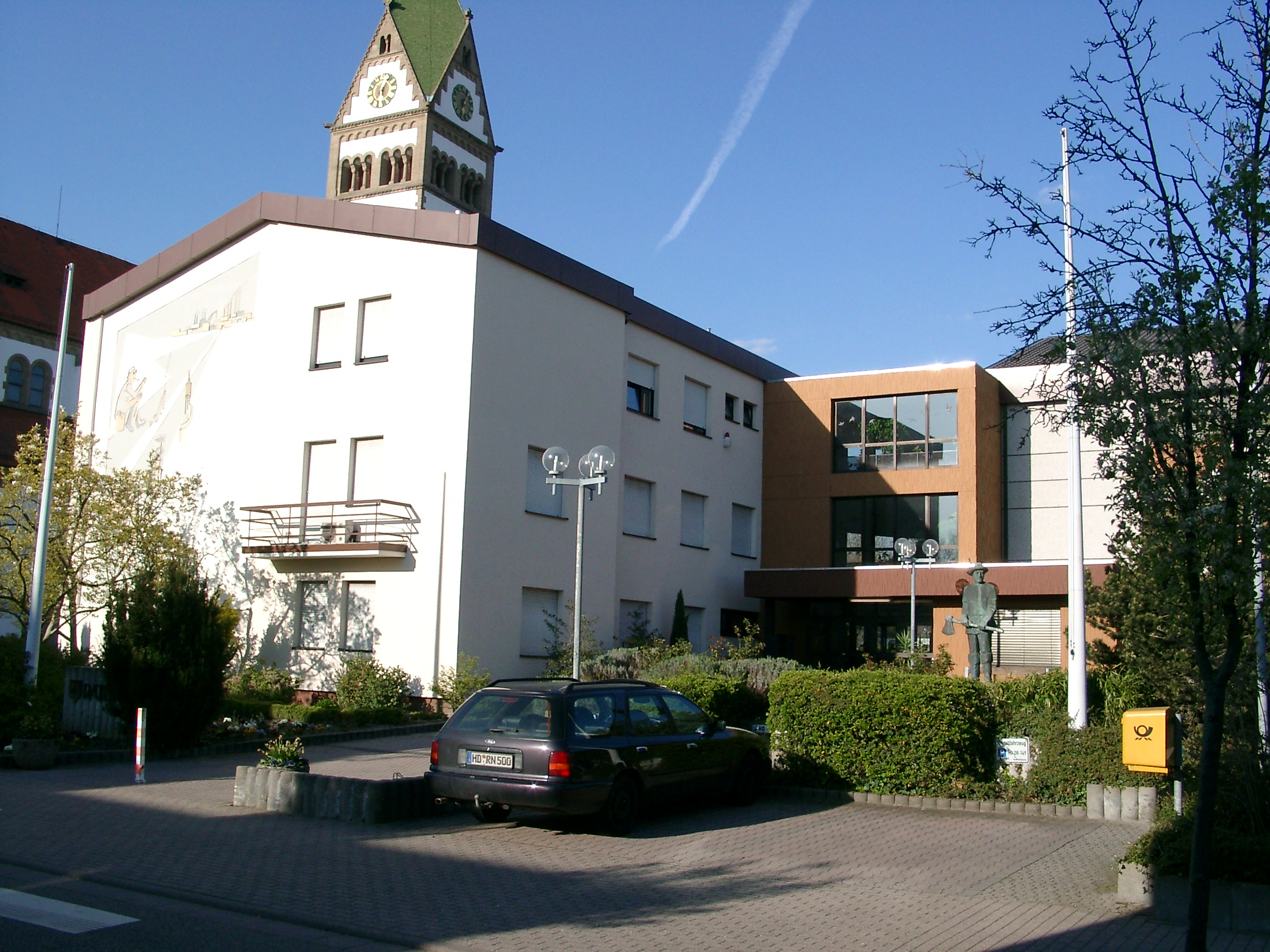 Ketsch, Rathaus